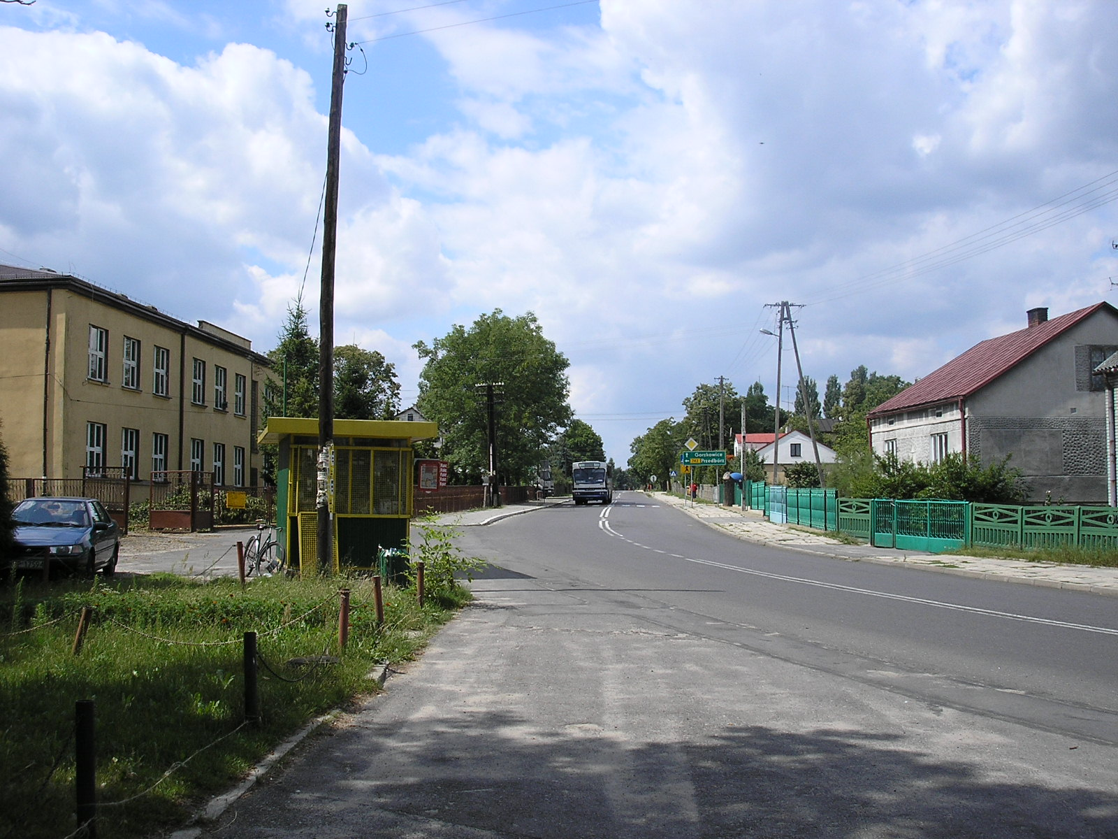 Główna ulica w Ręcznie. Po lewej stronie szkoła podstawowa oraz gimanzjum.